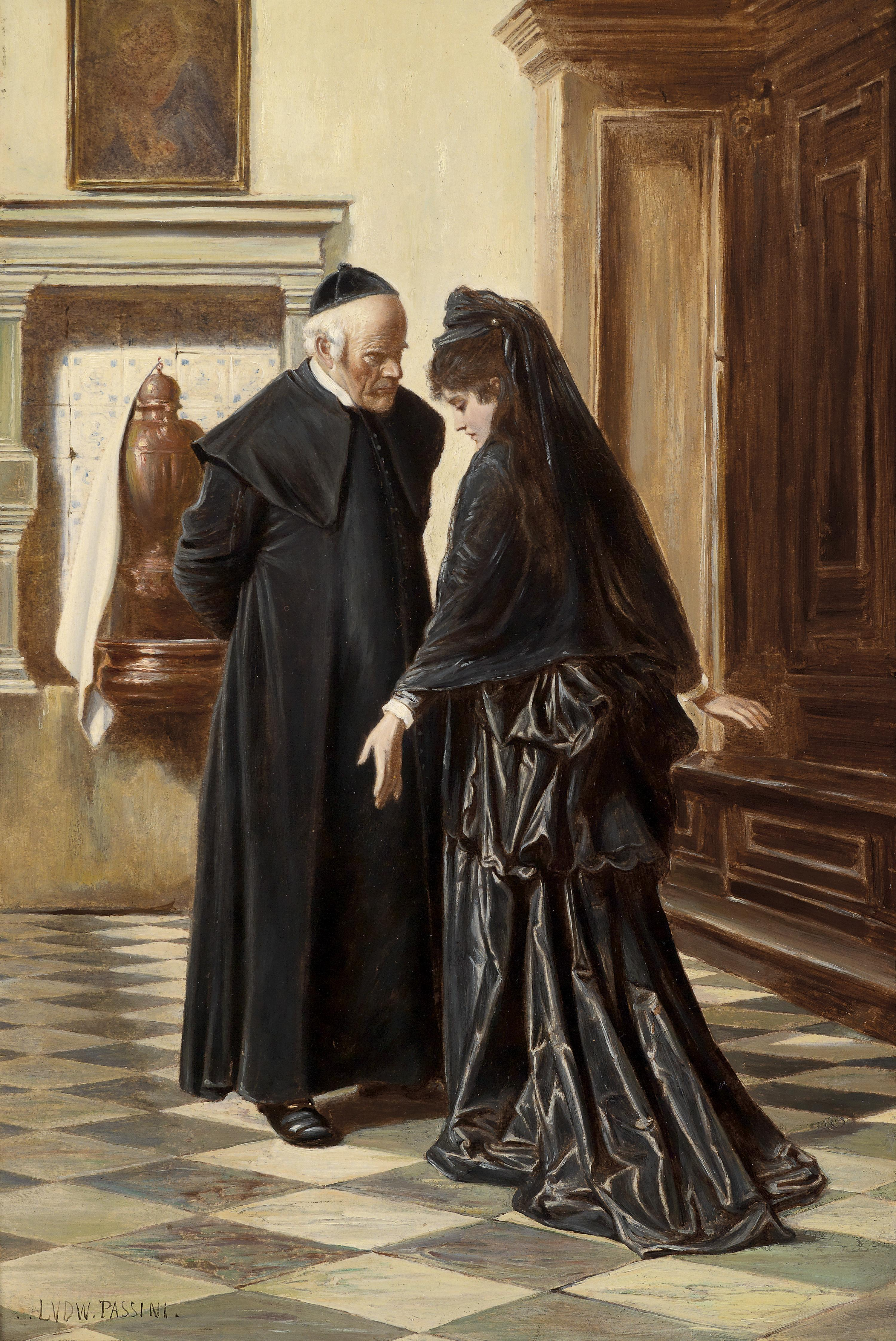 Ein ernstes Gesprächlabel QS:Lde,"Ein ernstes Gespräch"